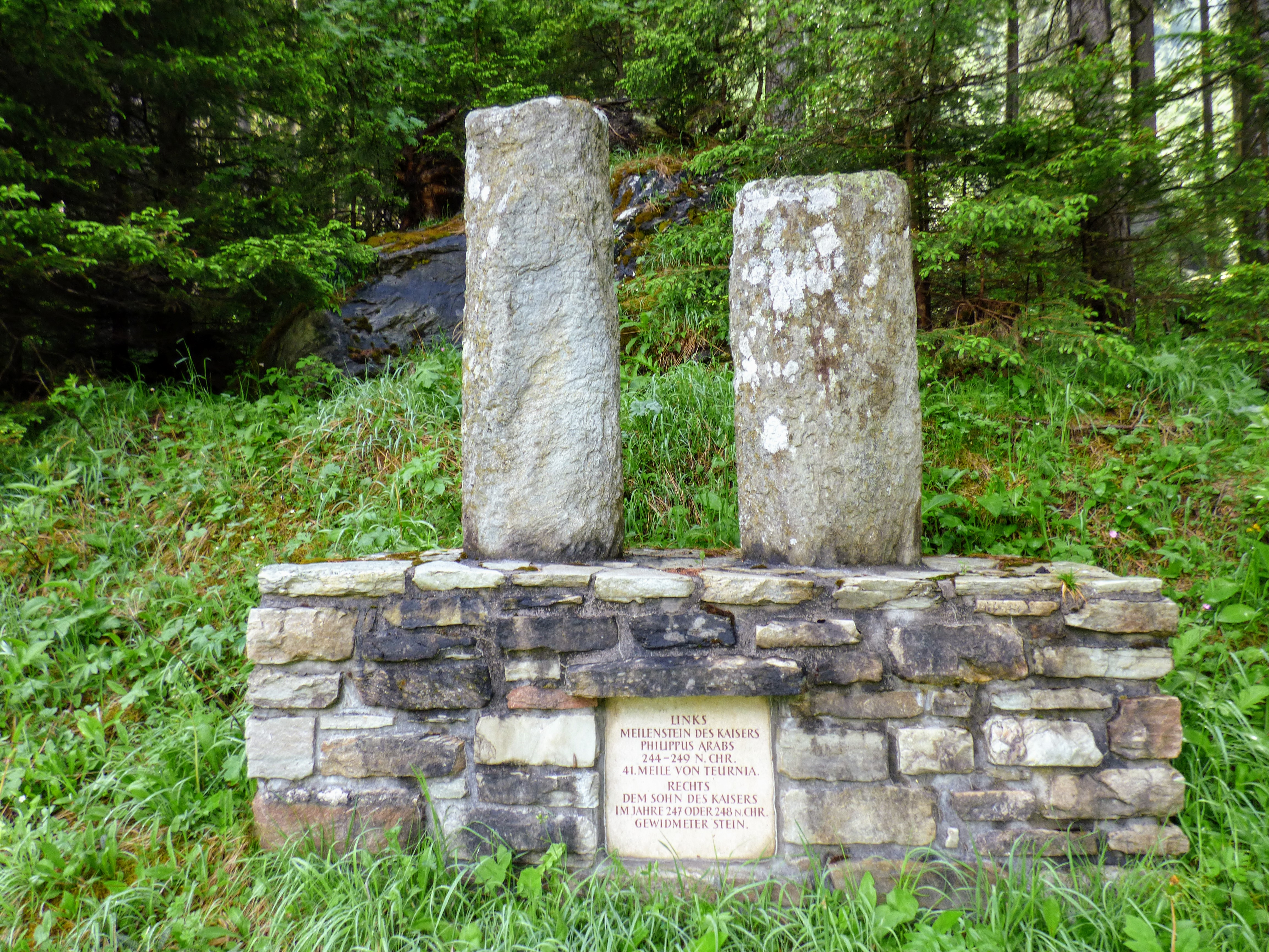 römische Meilensteine an der Katschberg-Bundesstraße B99, nördlich von Tweng (Salzburg) Object location47° 11′ 50.95″ N, 13° 35′ 32.83″ E